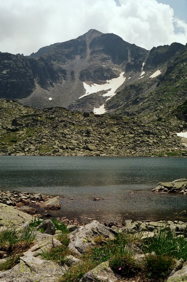 Musała (2925 m n.p.m.) - najwyższy szczyt Półwyspu Bałkańskiego (w paśmie Riła). Zdjęcie wykonane w sierpniu 2004 przez użytkownika Scythian. Scythian 17:13, 22 lip 2005 (CEST) Слика:Musala1.jpg